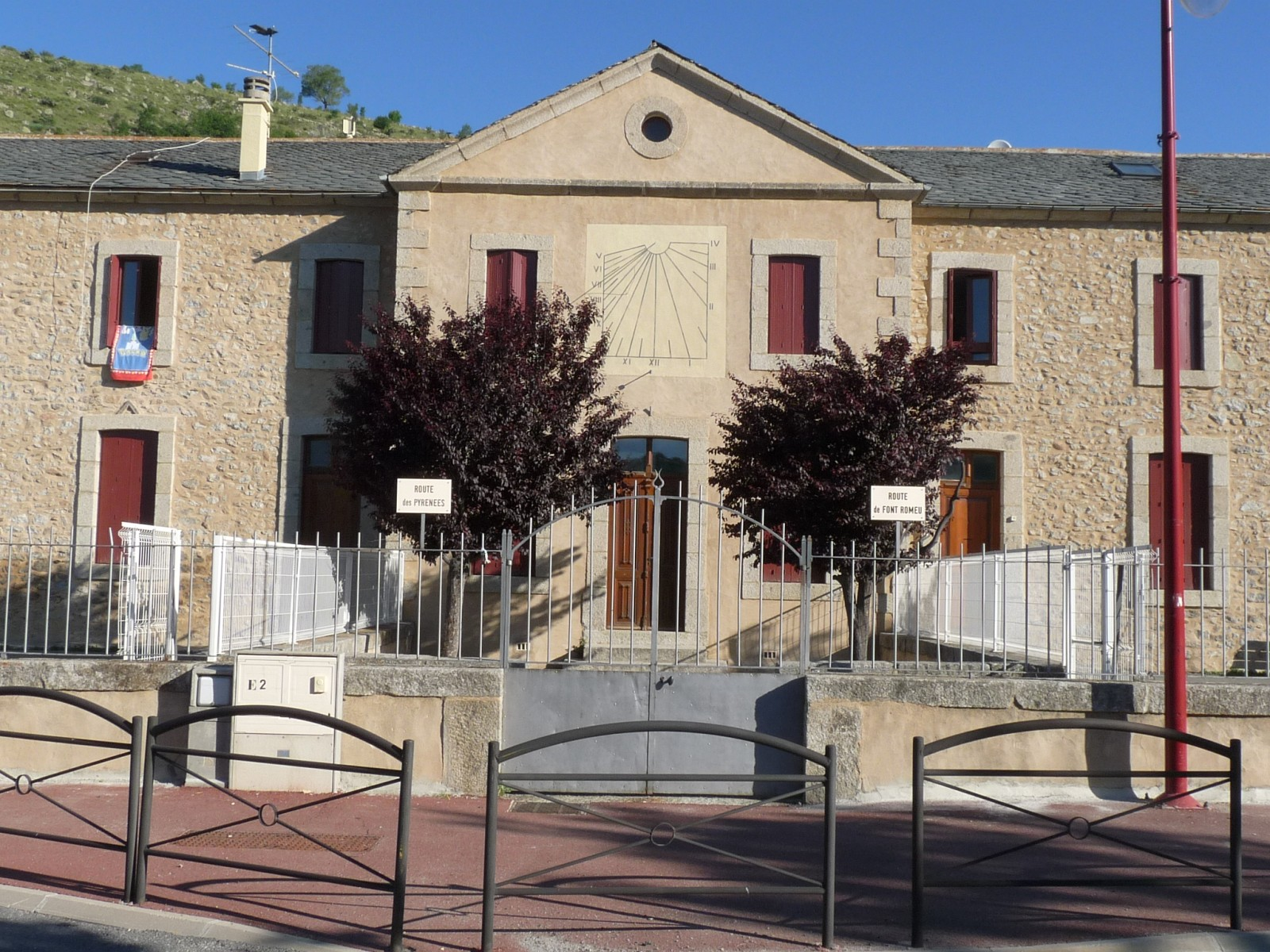 Ancienne mairie, Angoustrine-Villeneuve-des-Escaldes, P.O., France